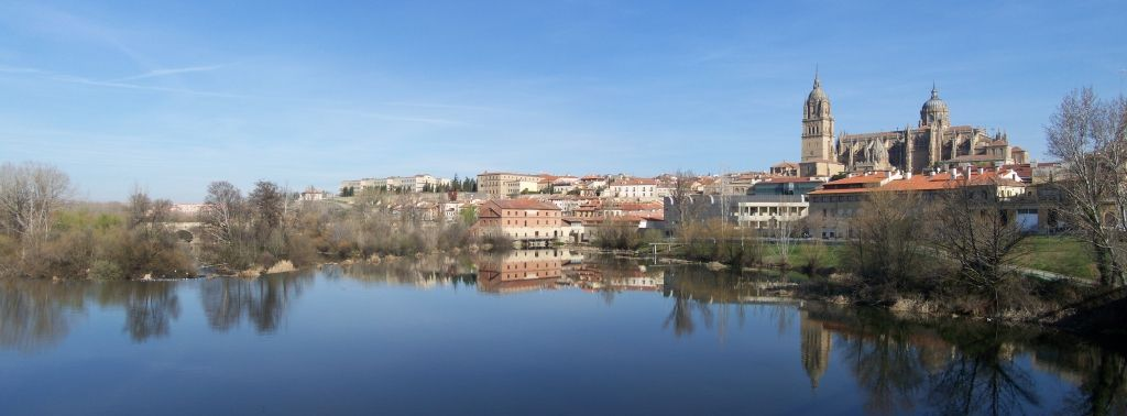 Salamanca: río Tormes y Catedral / Panorámica utilizando Autopano + Hugin